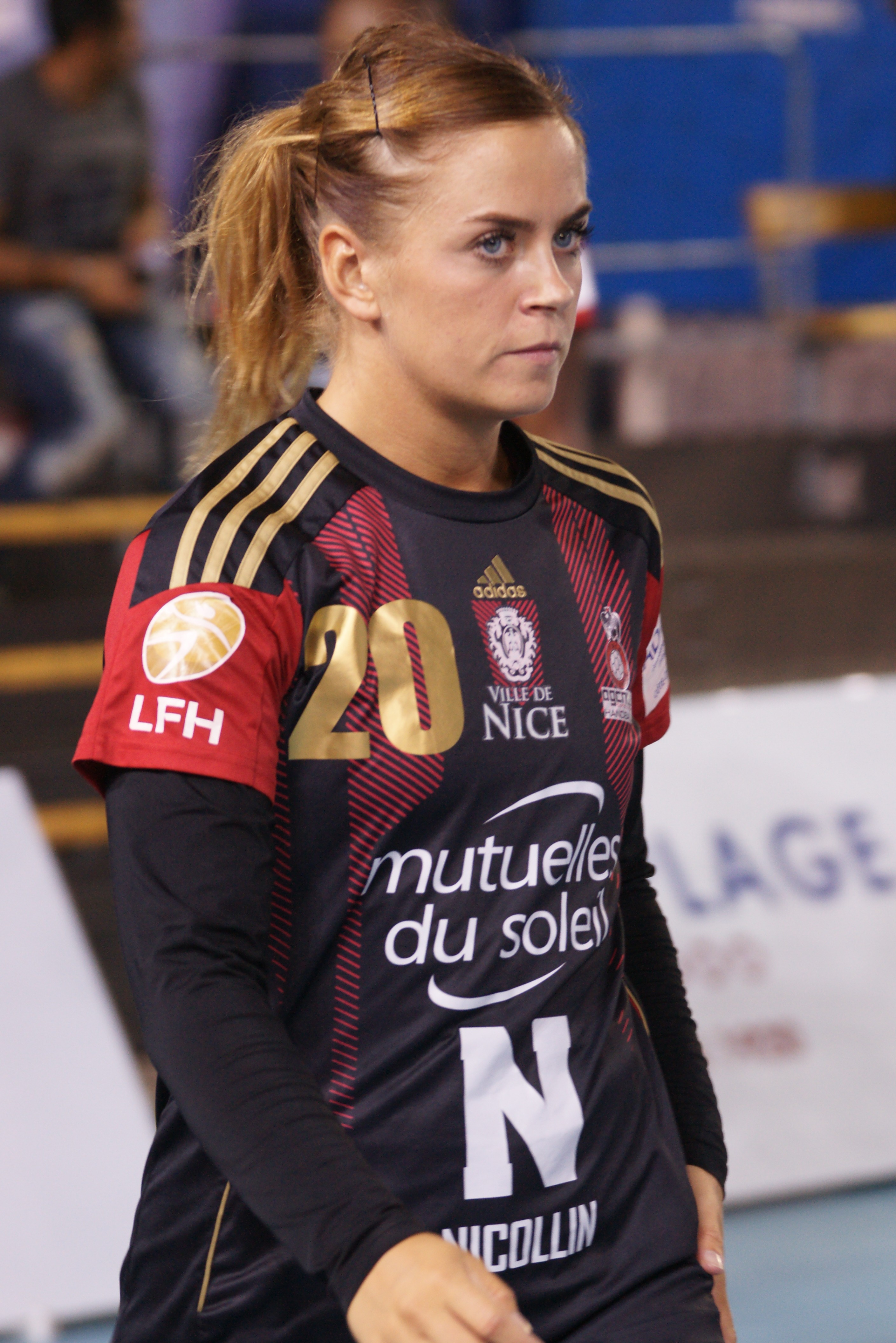 Karen Knútsdóttir OGC Nice-Fleury 2016